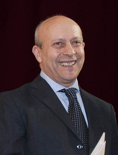 Euskara omendua izan da Madrilen